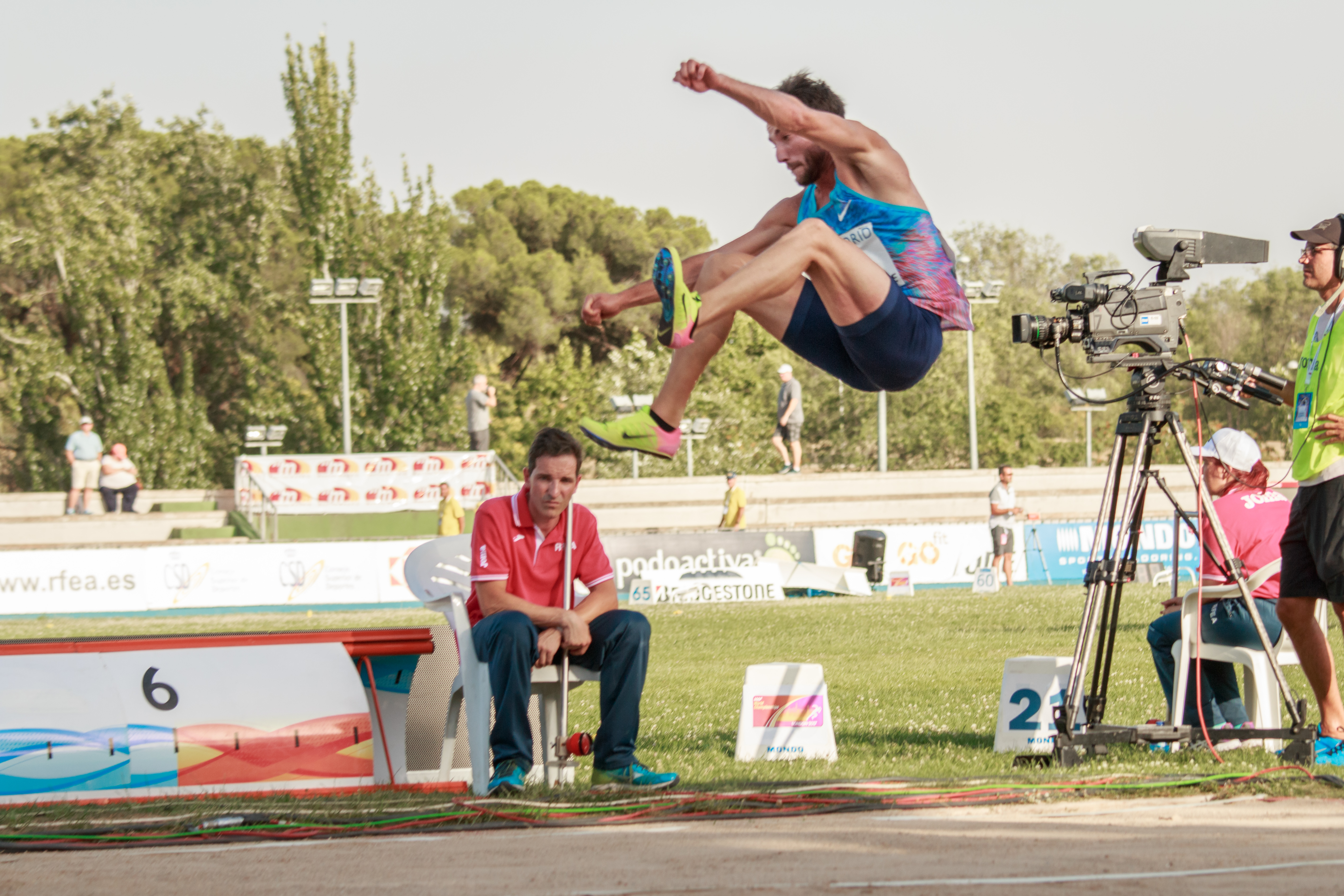 Emiliano Lasa (URU). Salto en largo. IAAF World Challenge. Meeting Madrid 2017. Moratalaz, Madrid.